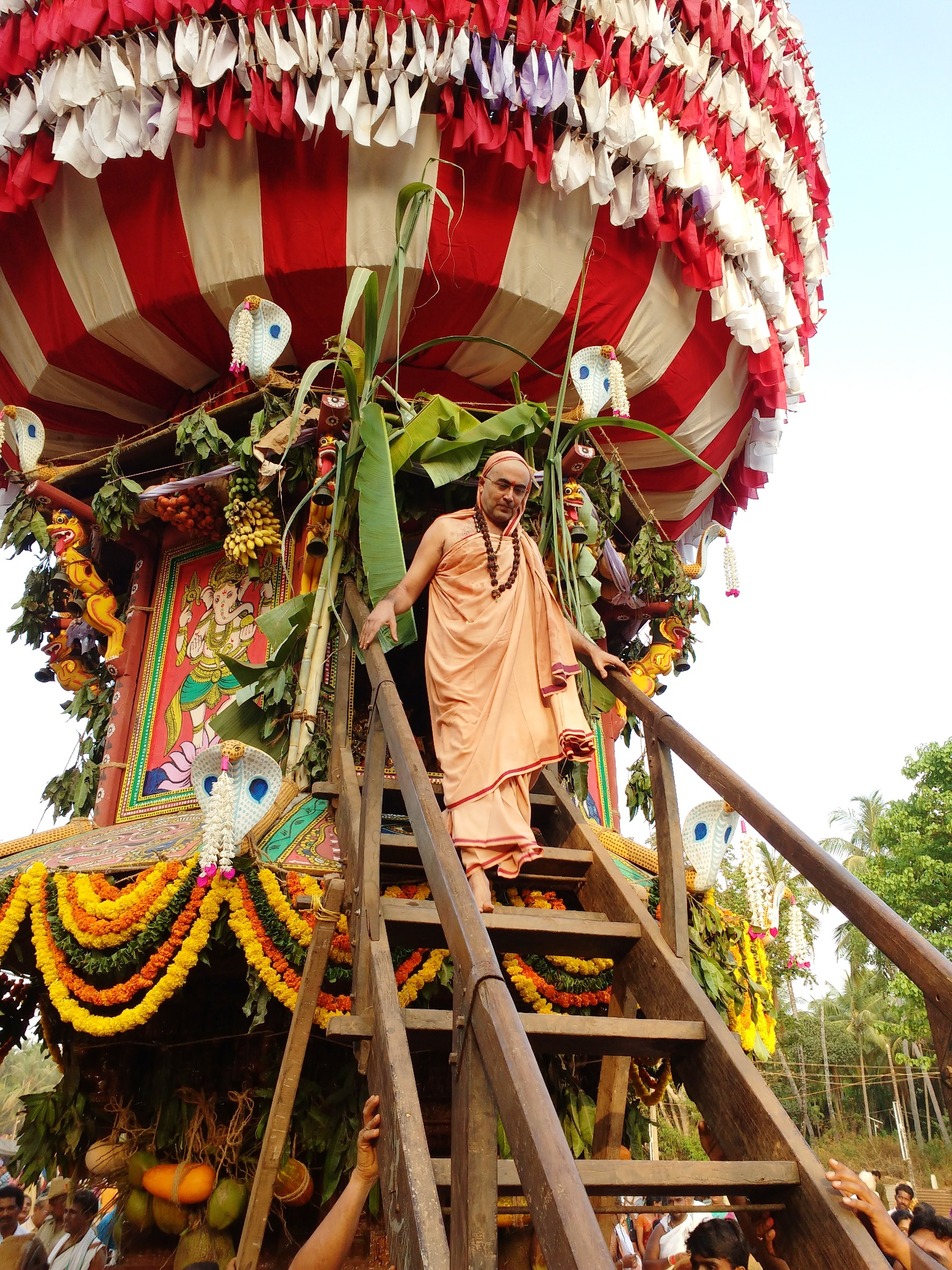 ಕನ್ನಡ: ಚಿತ್ರಾಪುರ ರಥೋತ್ಸವ